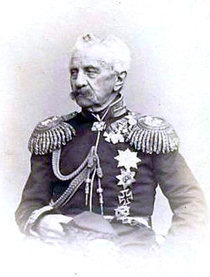 Хомутов, Михаил Григорьевич